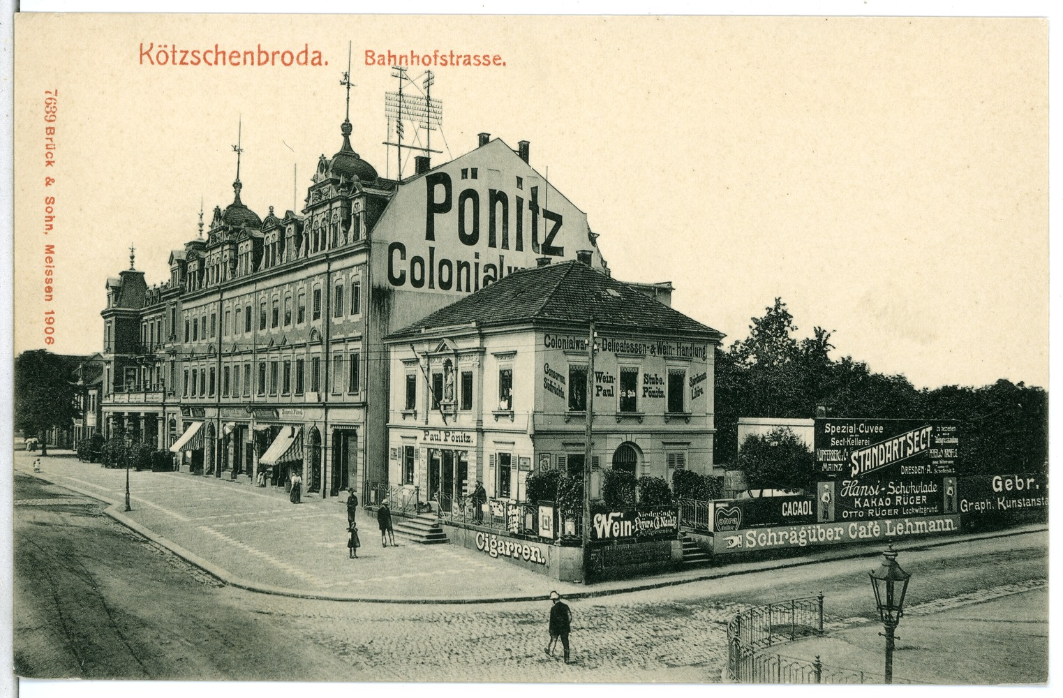 Kötzschenbroda; Bahnhofstraße This postcard is from publisher Brück & Sohn in Meißen ( postcard has a unique number 07639 and is available in a higher resolution at the publisher. This images was uploaded in a cooperation project between Wikipedians and the publisher.